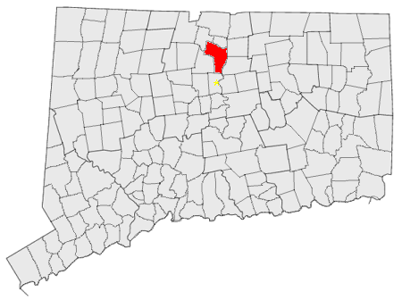 me